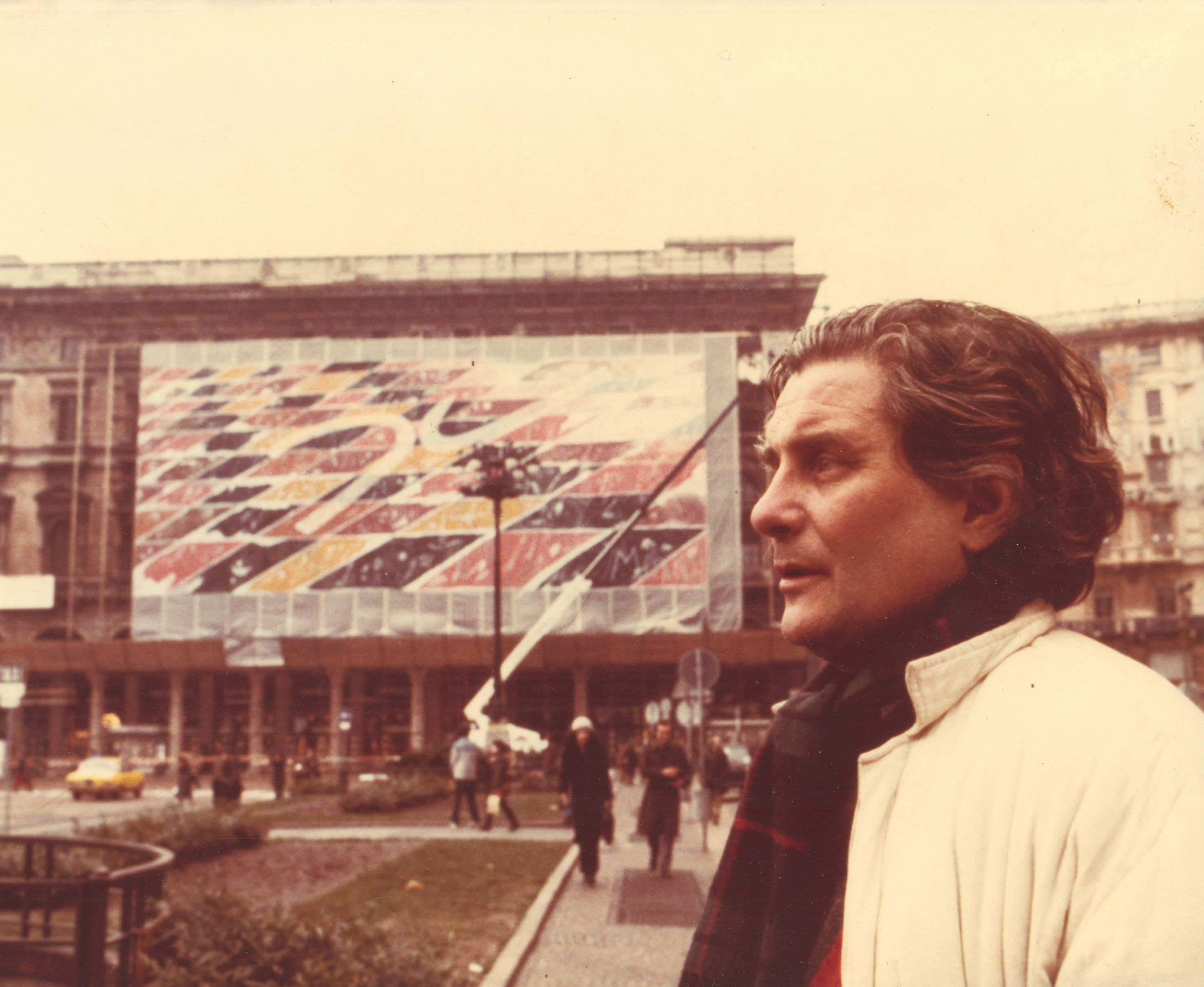 Ignazio Moncada, Piazza Duomo, Milano, 1982.